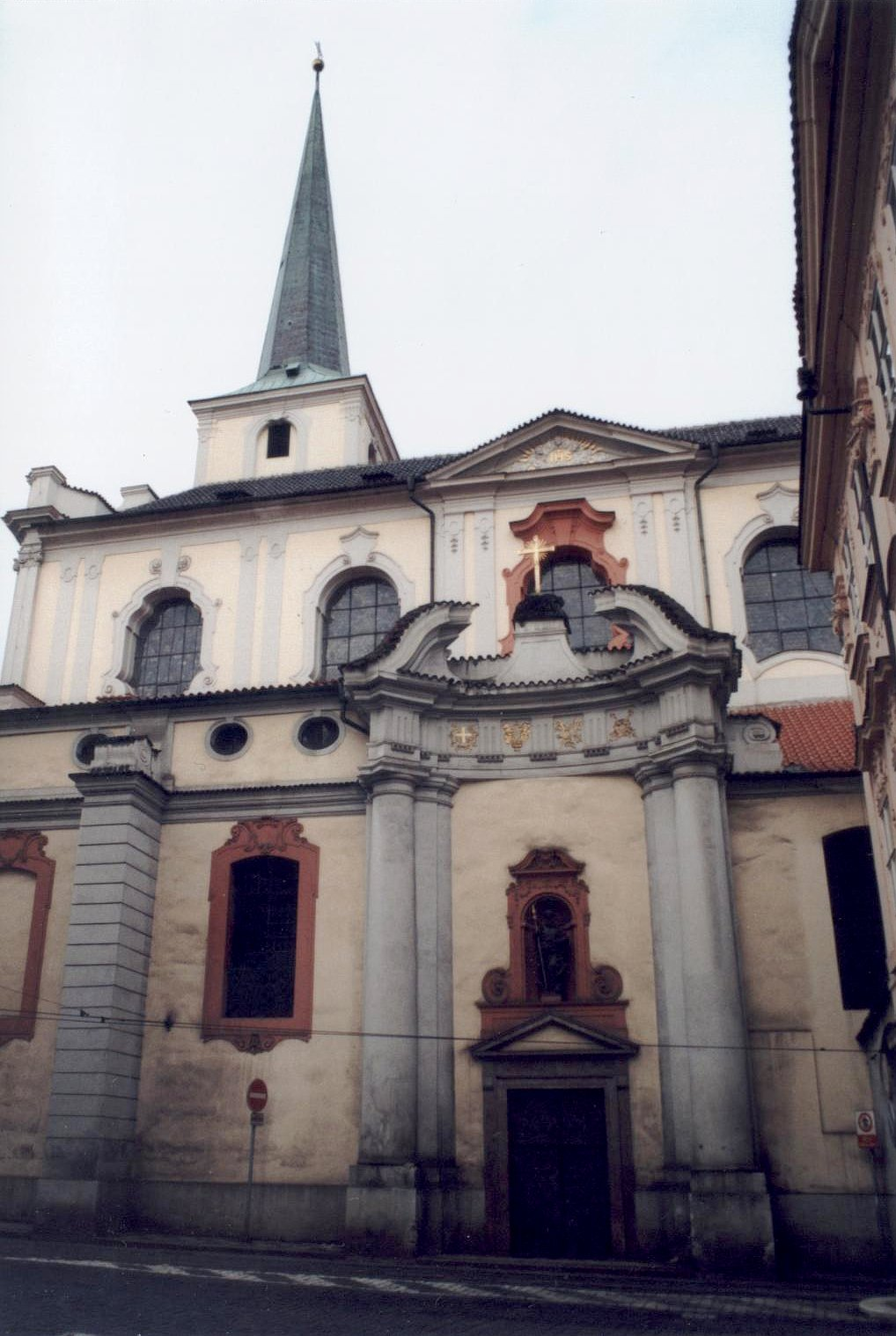 Kylián Ignác Dientzehoffer, boční průčelí kostela sv. Tomáš v Praze na Malé straně